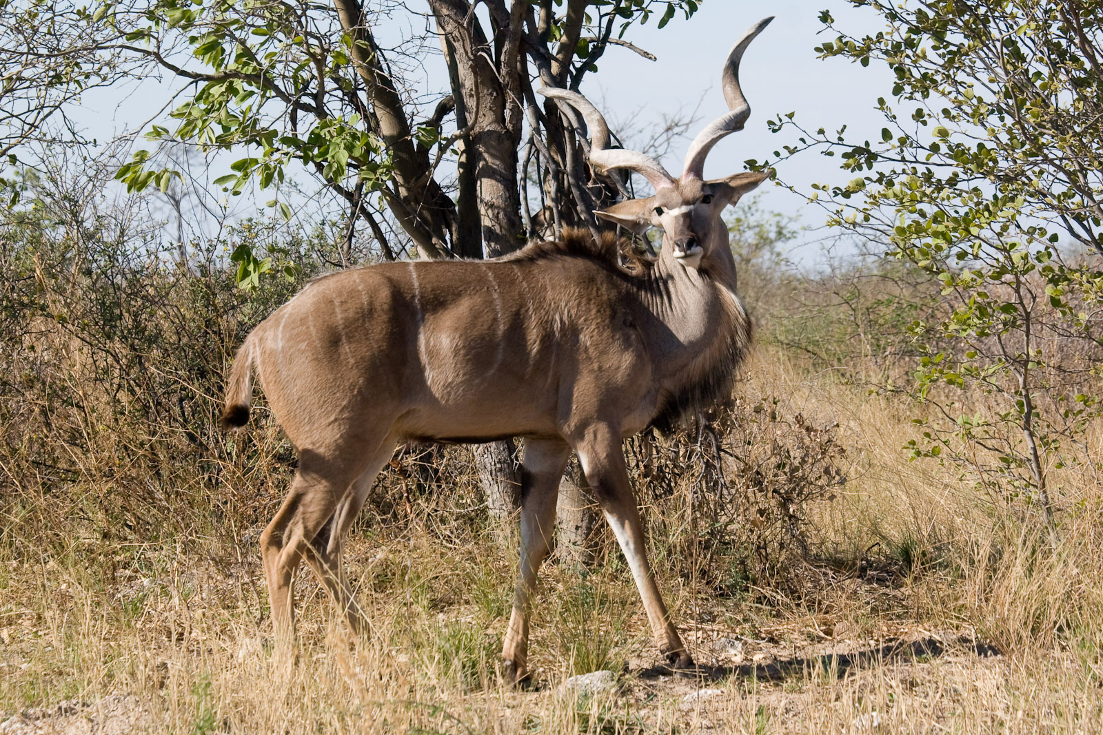 Male kudu